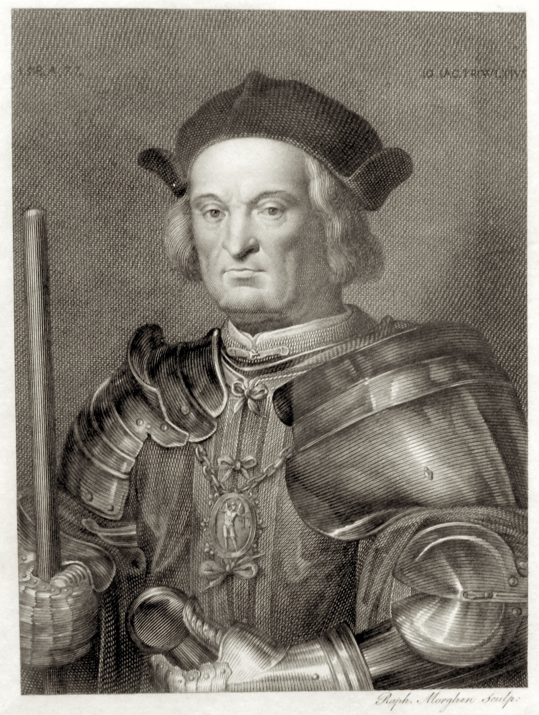 Gian Giacomo Trivulzio (1440-1518)